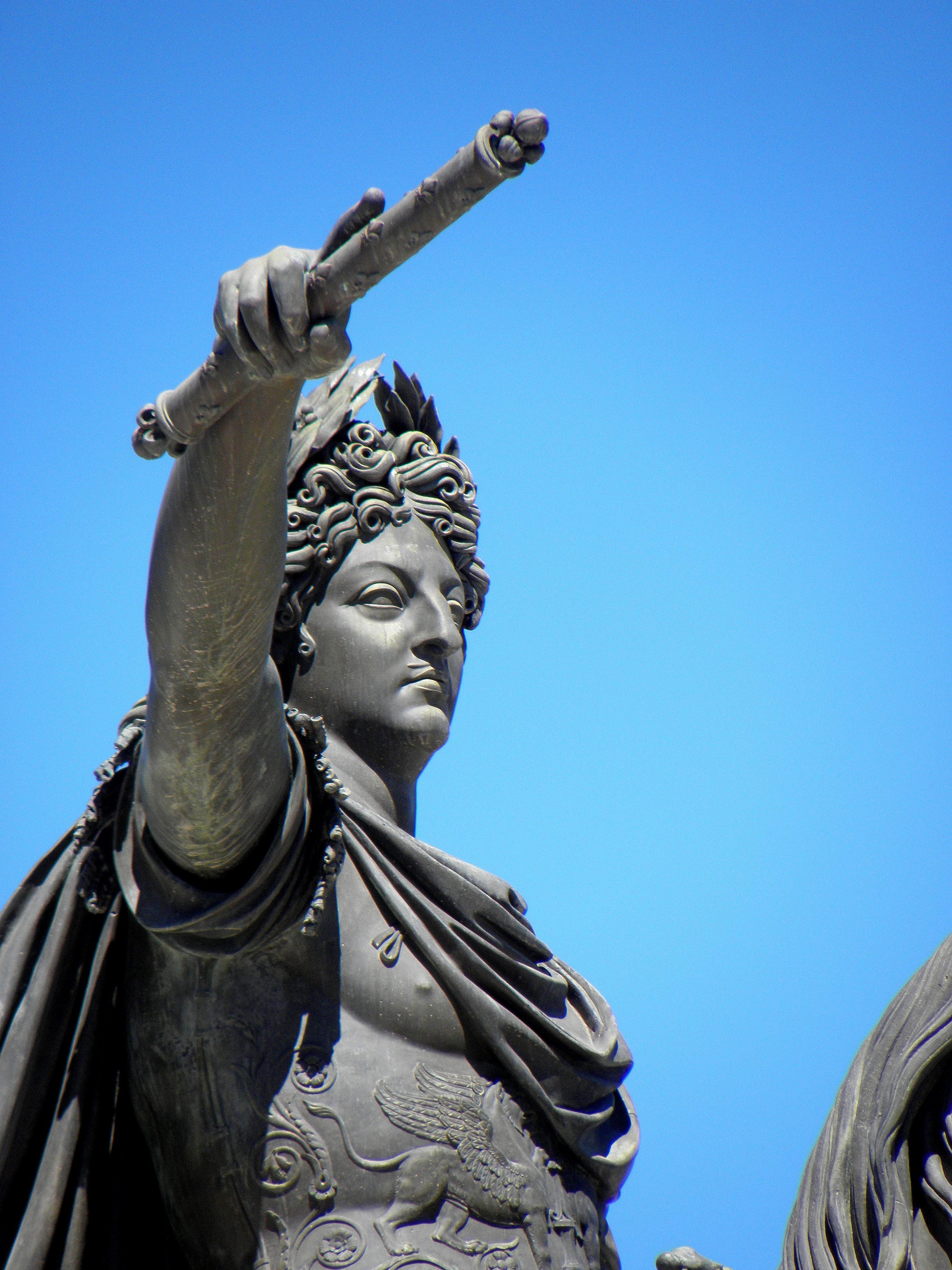 Statue de Louis XIV, Promenade du Peyrou, Montpellier (34).